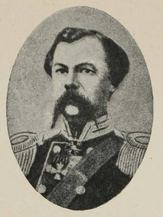 Семён Корнилович Новосёлов. Этот рисунок был использован для иллюстрирования статьи «Новоселов, Семен Корнилович» опубликованной в семнадцатом томе «Военной энциклопедии», который был издан книгоиздательским товариществом И. Д. Сытина в 1914 году в столице Российской империи городе Санкт-Петербурге. Более подробное описание к этой картинке можно прочесть в указанной выше статье на сайте Русской Викитеки.